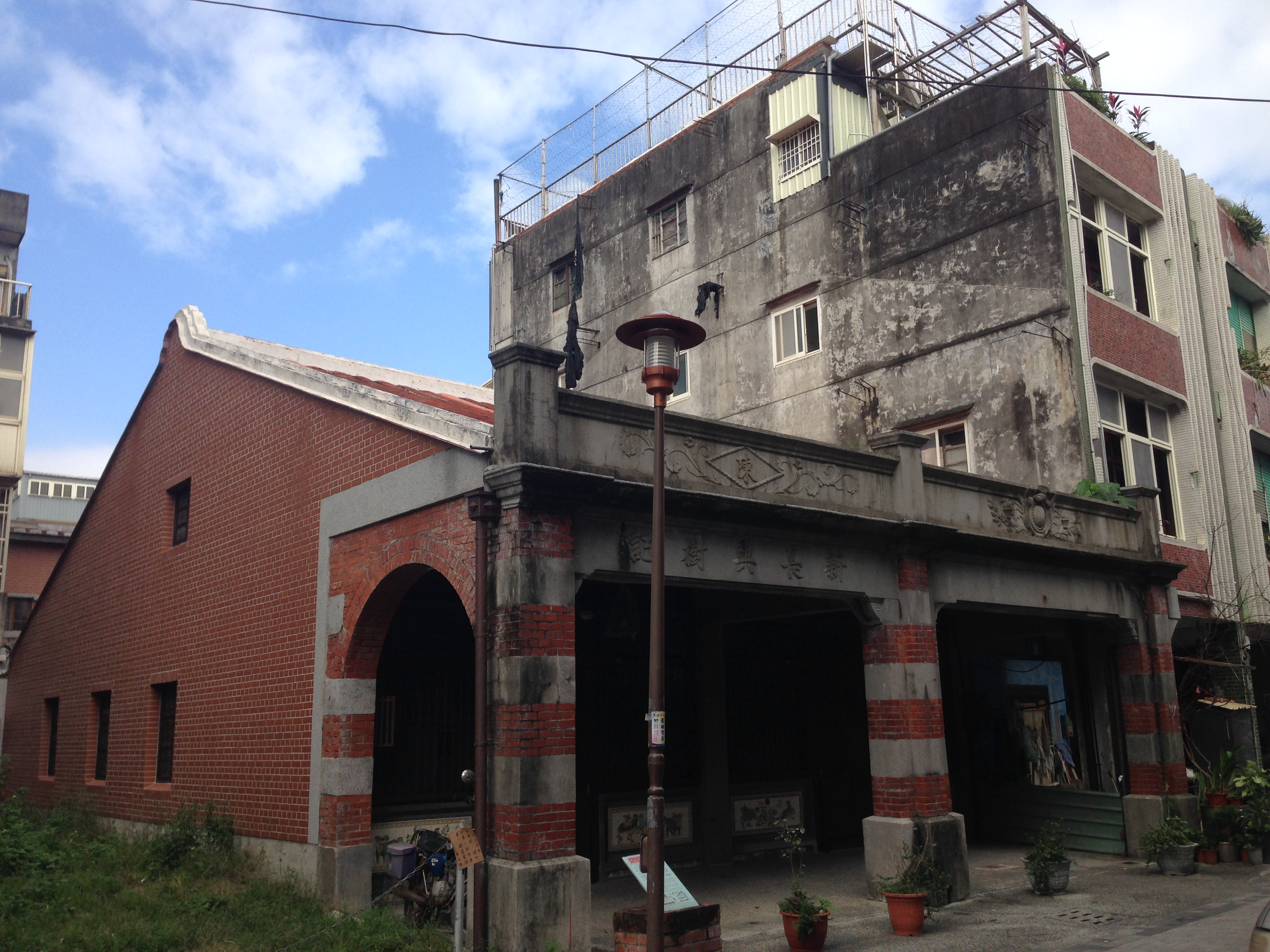 中文（台灣）: 頭城鎮新長興樹記屋